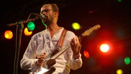 Reggaebandet Manna fra Bodø.